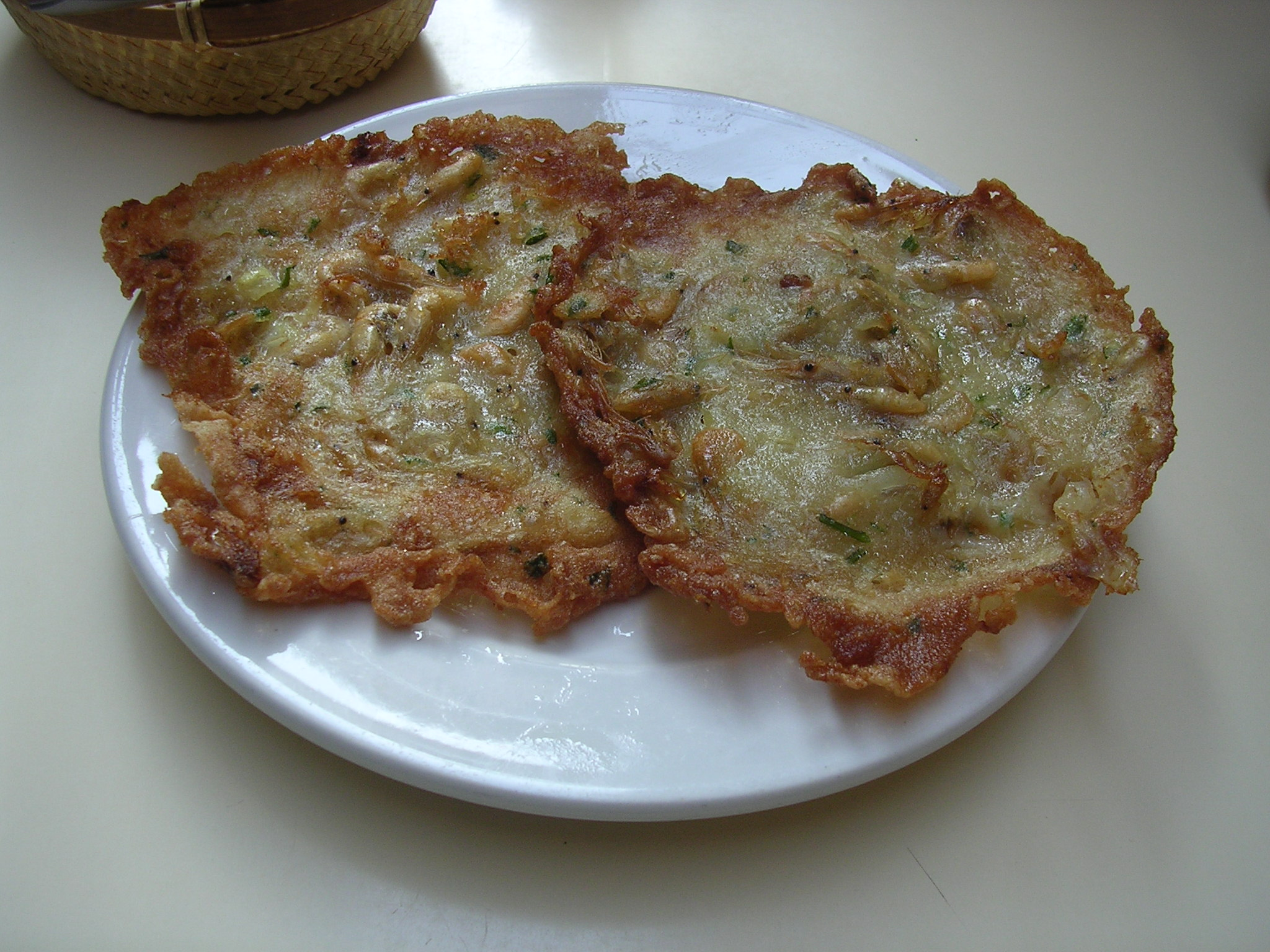 Krabbenpfannkuchen